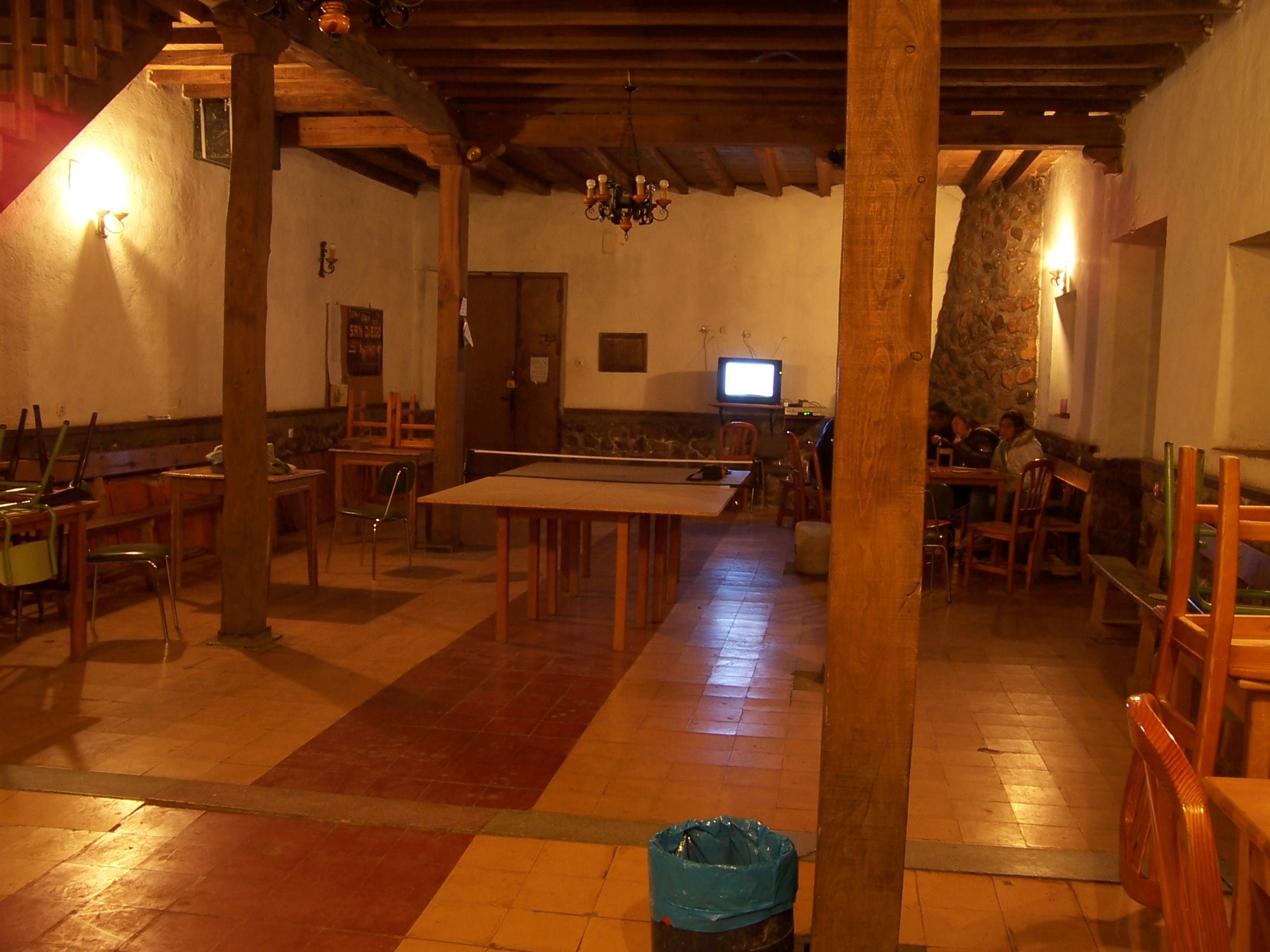 Centro Cultural El Cubillo. Lugar de reunión y esparcimiento de todo el pueblo, tanto en verano como en invierno